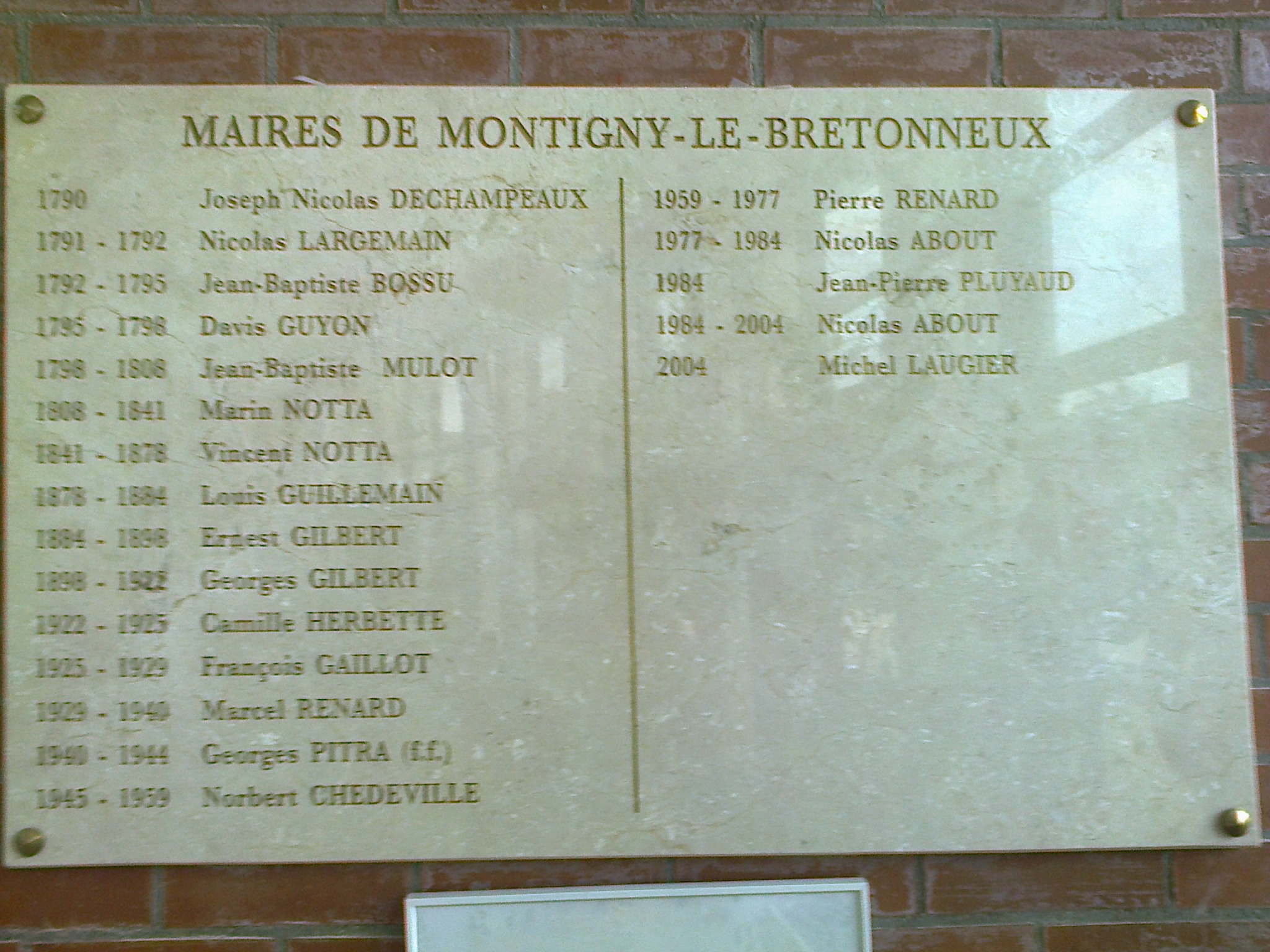 Plaque des noms des maires dans la mairie de Montigny le Bretonneux (78180)